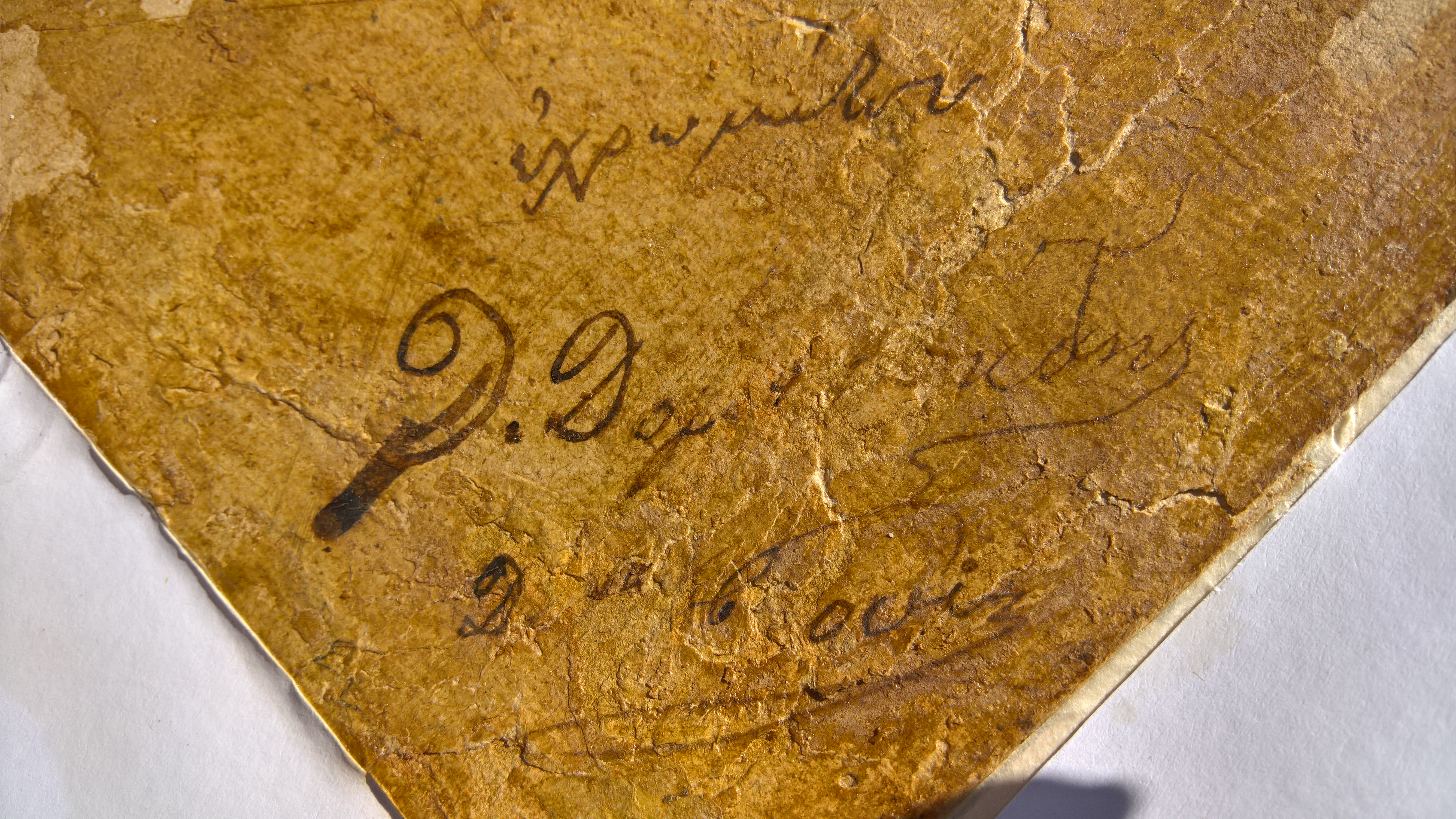 Авторски надпис върху гърба на елеофотографиятах"Надежда,Вяра,Благотворителност",автор - Димитър Добрович